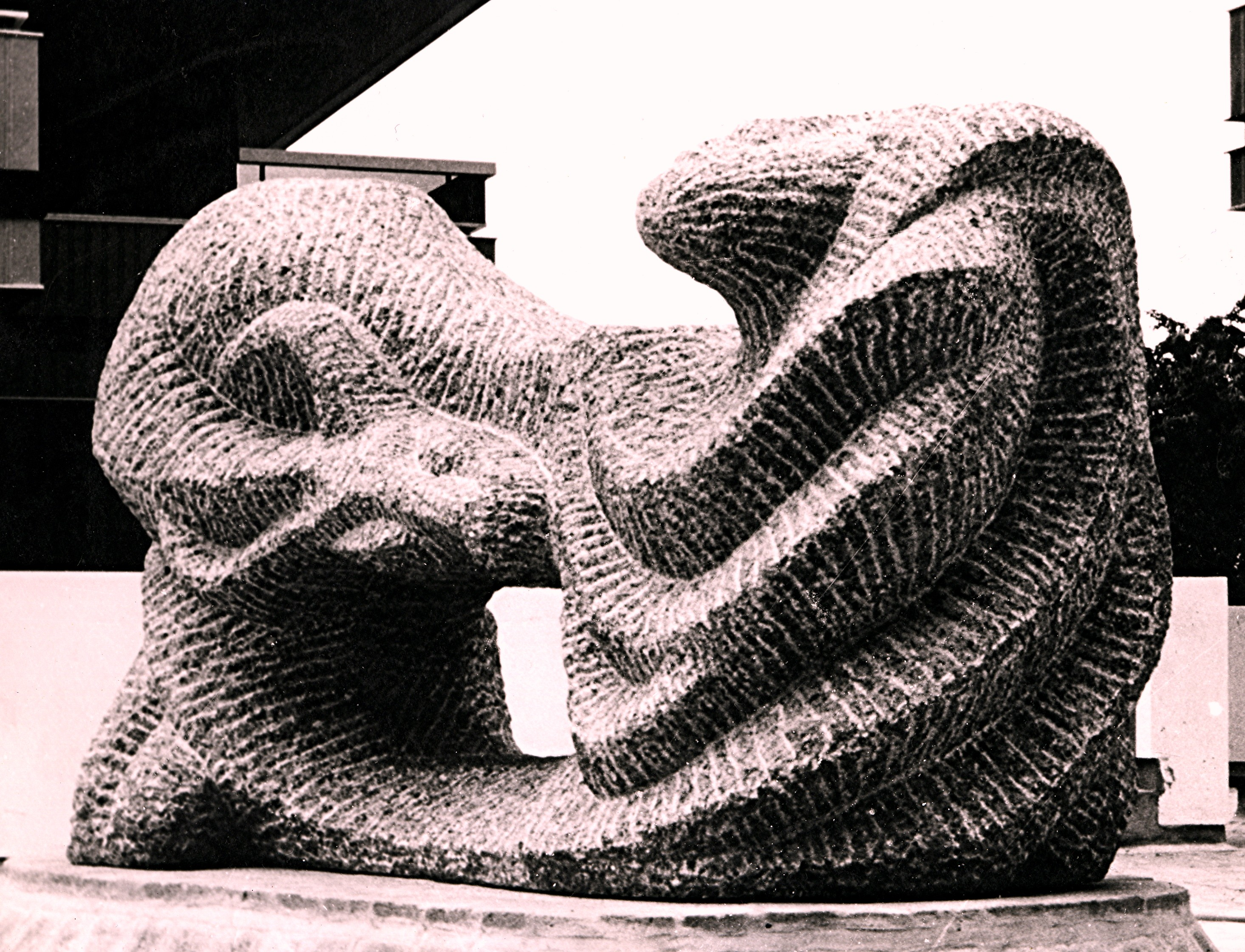 Tauromachie de Shelomo Selinger, Granit rose 135 x 210 x 80, à l'emplacement des arènes du Bouscat, Bordeaux.